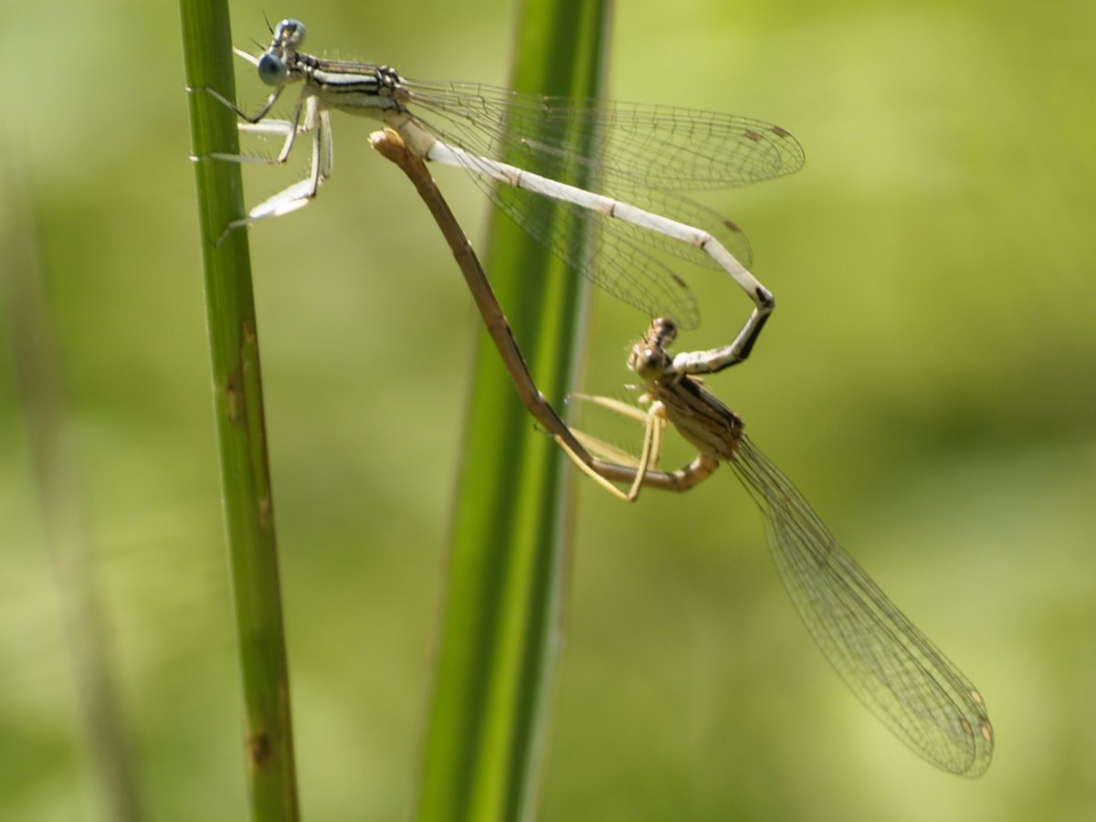 Platycnemis latipes còpula